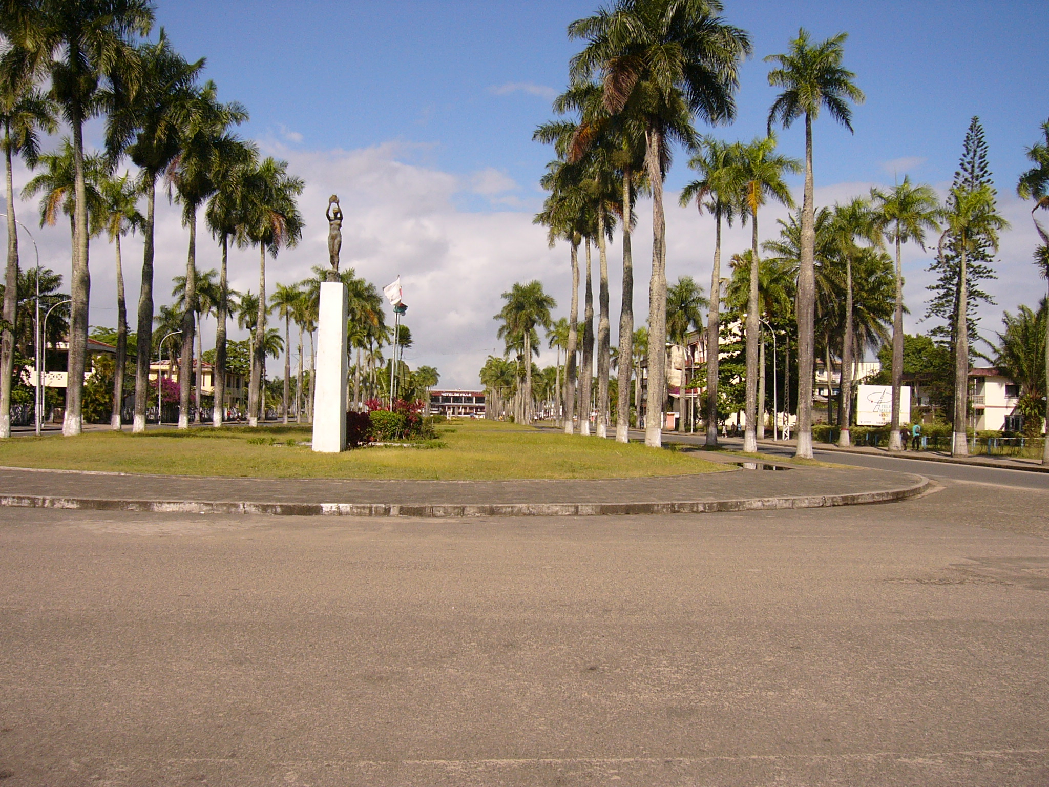 Tamatave